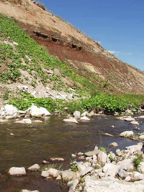 Родниковские обрывы, Абдулинский район This image is related to the protected area of Russia number 5610002